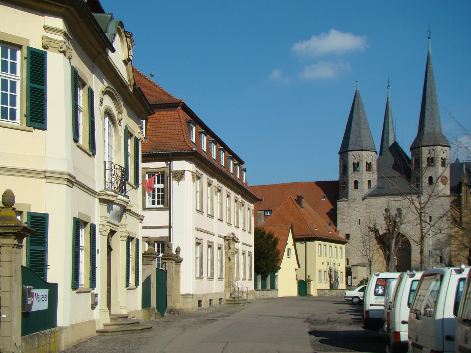 Lindenplatz mit ehem. Dechanei und Kustodiengebäude des ehem. Ritterstifts in Bad Wimpfen